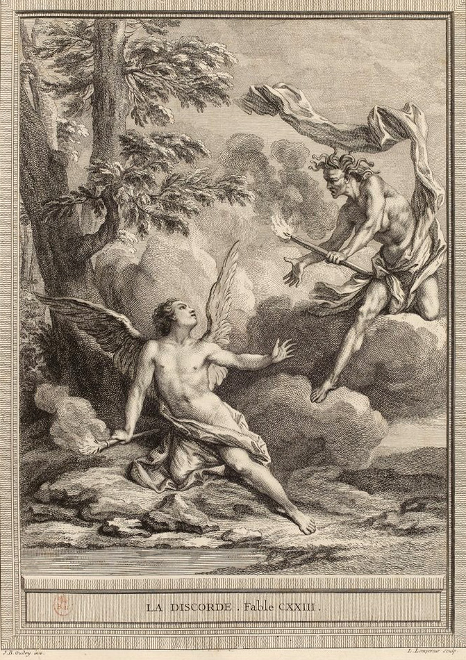 Gravure réalisée par Louis Simon Lempereur d'après un dessin de Jean-Baptiste Oudry représentant la fable La discorde de Jean de La Fontaine (fable 20 du livre VI). Cette gravure est parue dans l'édition complète des fables de La Fontaine, parue en quatre tomes chez l'éditeur Desaint & Saillant, rue saint Jean de Beauvais à Paris, 1755-1759.